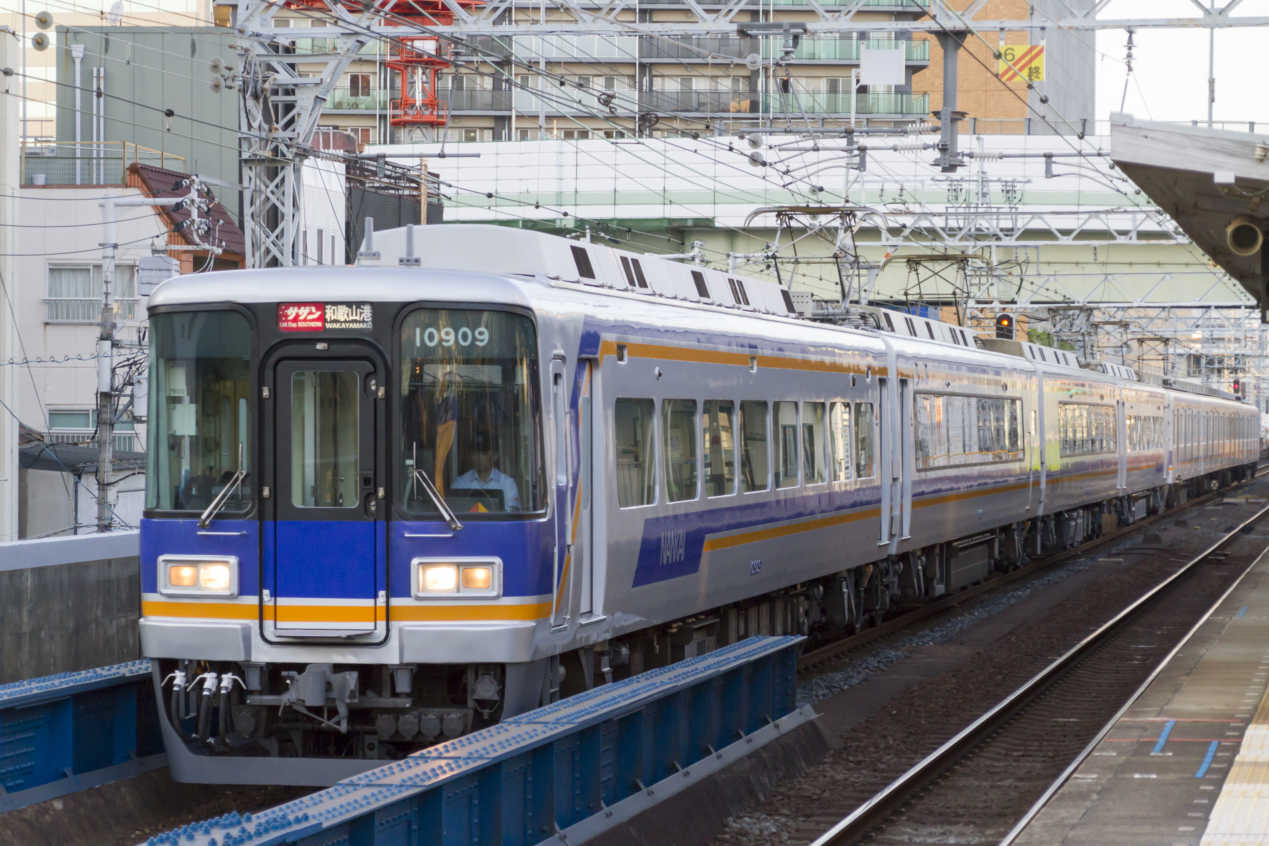 南海電鉄10000系電車。2017年9月8日、今宮戎駅にて。 Canon EOS 7D